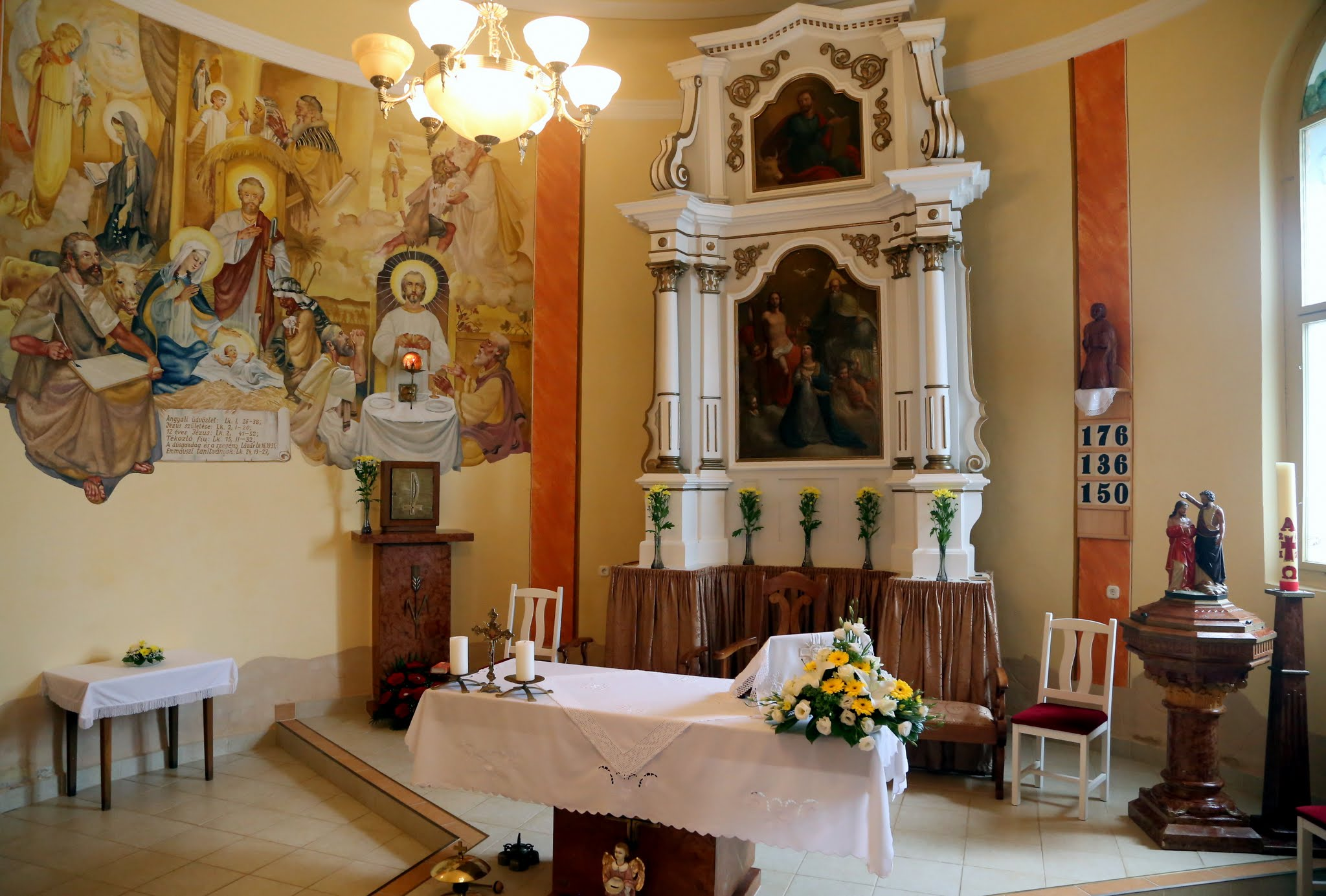 Kondorfa rk templomának szentélye